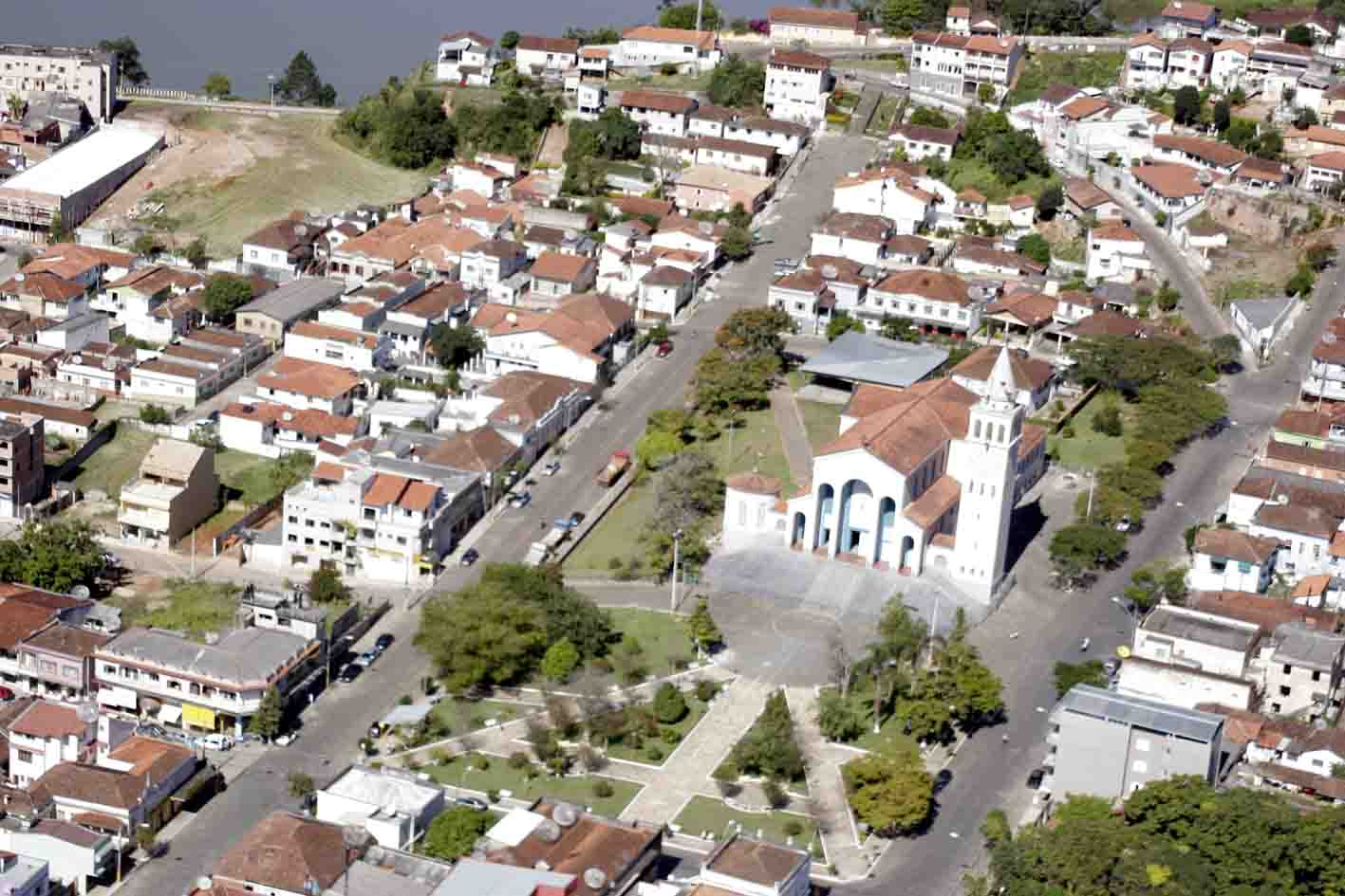 Igreja Matriz N.S. da Saúde